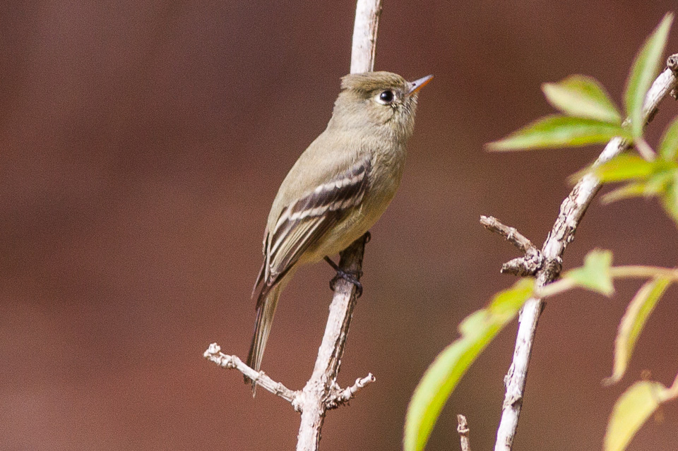 Durango Highway,Sinaloa